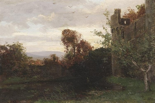 Burg Densborn bei Gerolstein im Abendlicht. Öl auf Holz, 24 x 35,5 cm